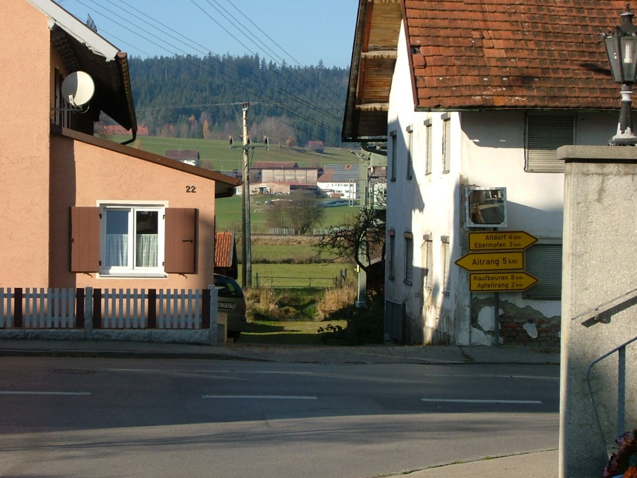 Ruderatshofen